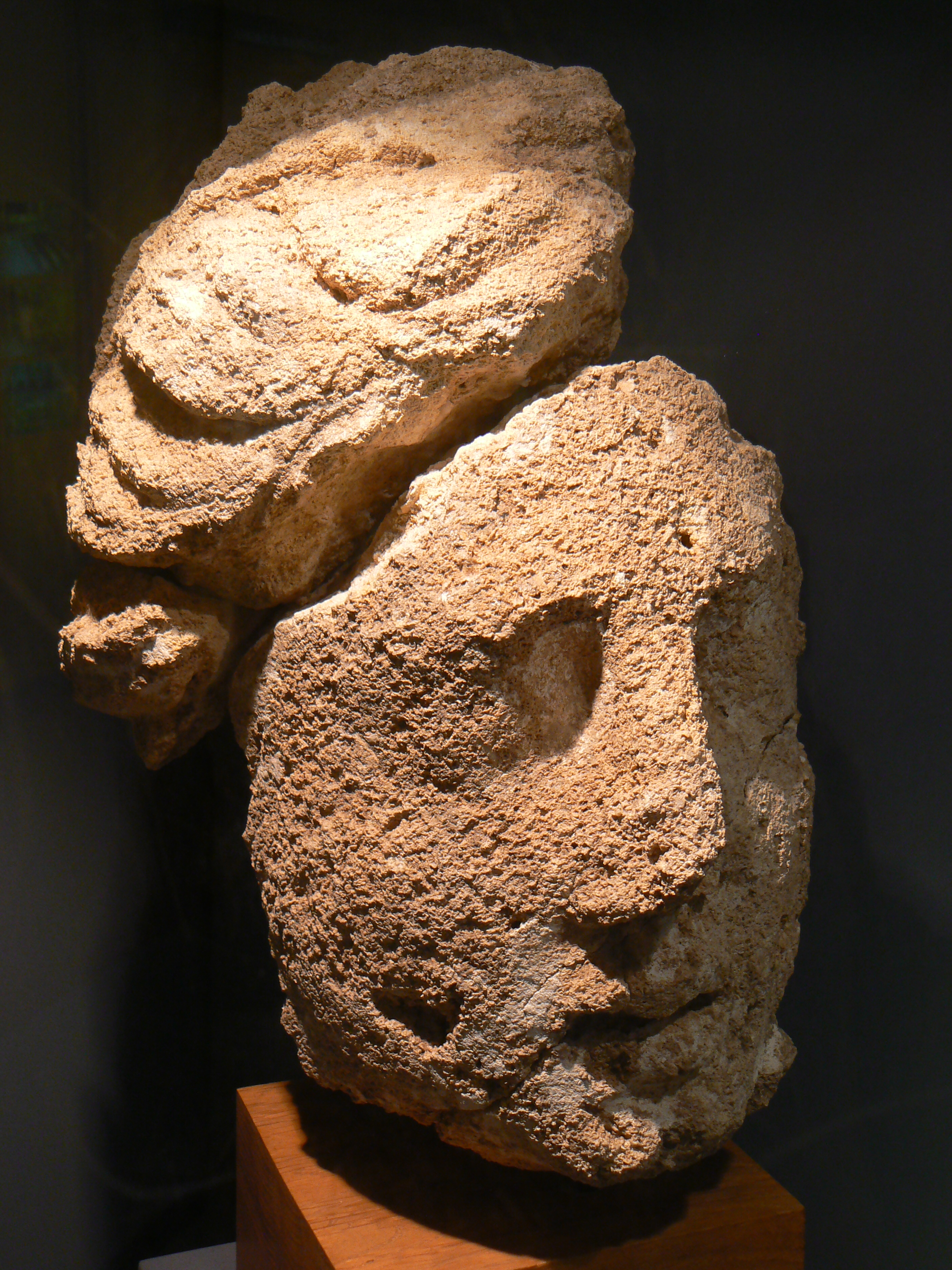 Tête de déesse-mère trouvée dans les fouilles du sanctuaire de Jublains, et désormais au musée archéologique départemental de la même commune.